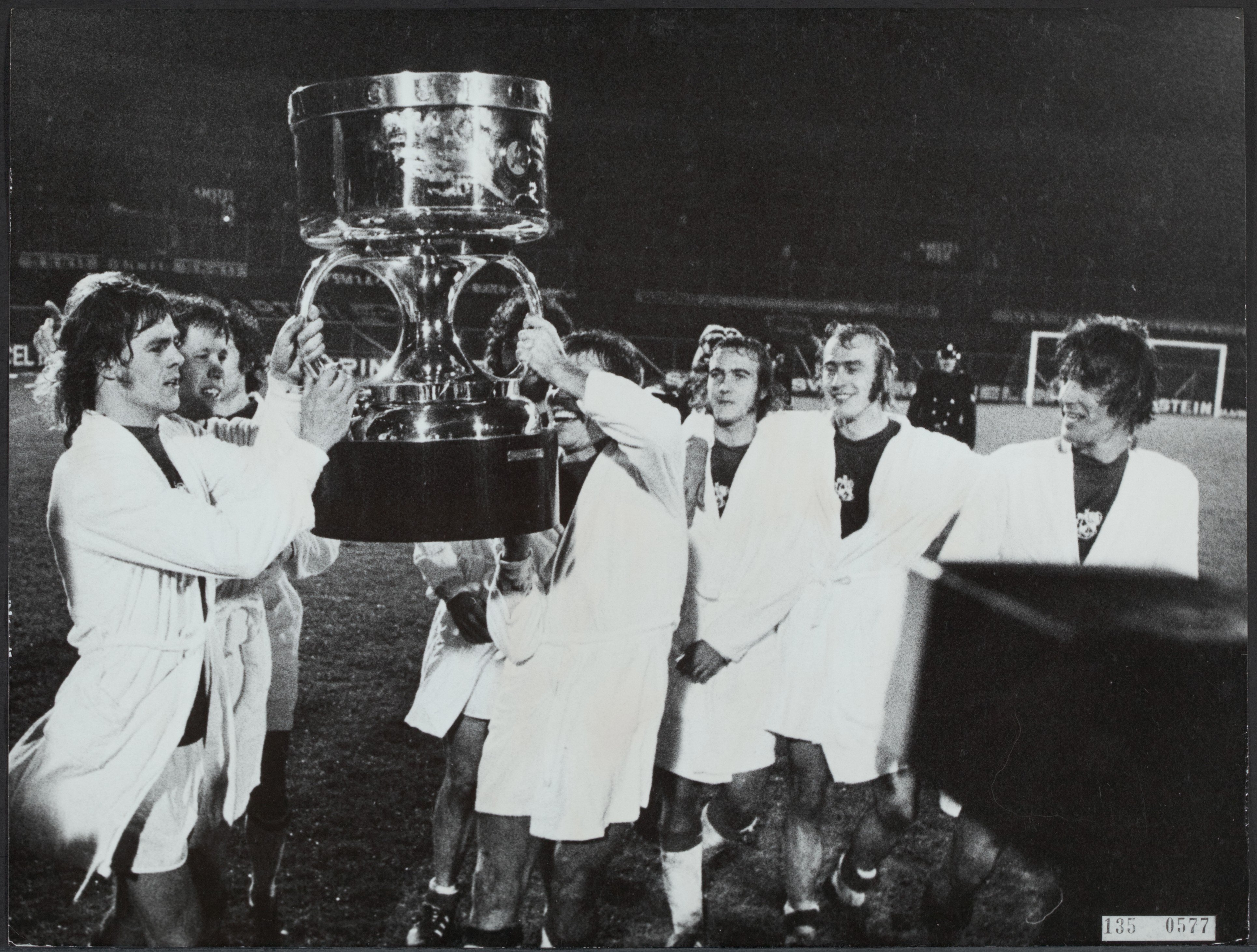 Amsterdam, Olympisch Stadion, 16 gennaio 1974. I calciatori dell'Ajax festeggiano al termine della vittoriosa finale di ritorno della Supercoppa UEFA 1973, che vide contrapposti, come detentori della Coppa dei Campioni 1972-73, agli italiani del Milan detentori della Coppa delle Coppe 1972-73; nel retour match gli ajacidi ribaltarono in goleada (6-0) la sconfitta patita sette giorni prima allo stadio San Siro di Milano (0-1). Si trattò della prima edizione ufficialmente sotto l'egida dell'UEFA per questo trofeo, dopo l'esordio ufficioso del 1972.